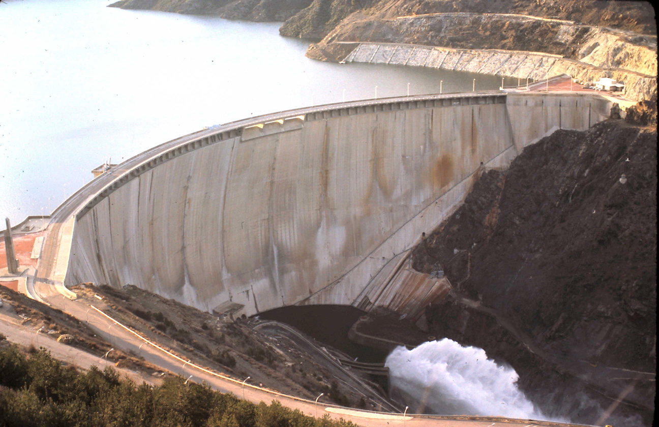 Desembalse de emergencia para estabilizar la fisura.